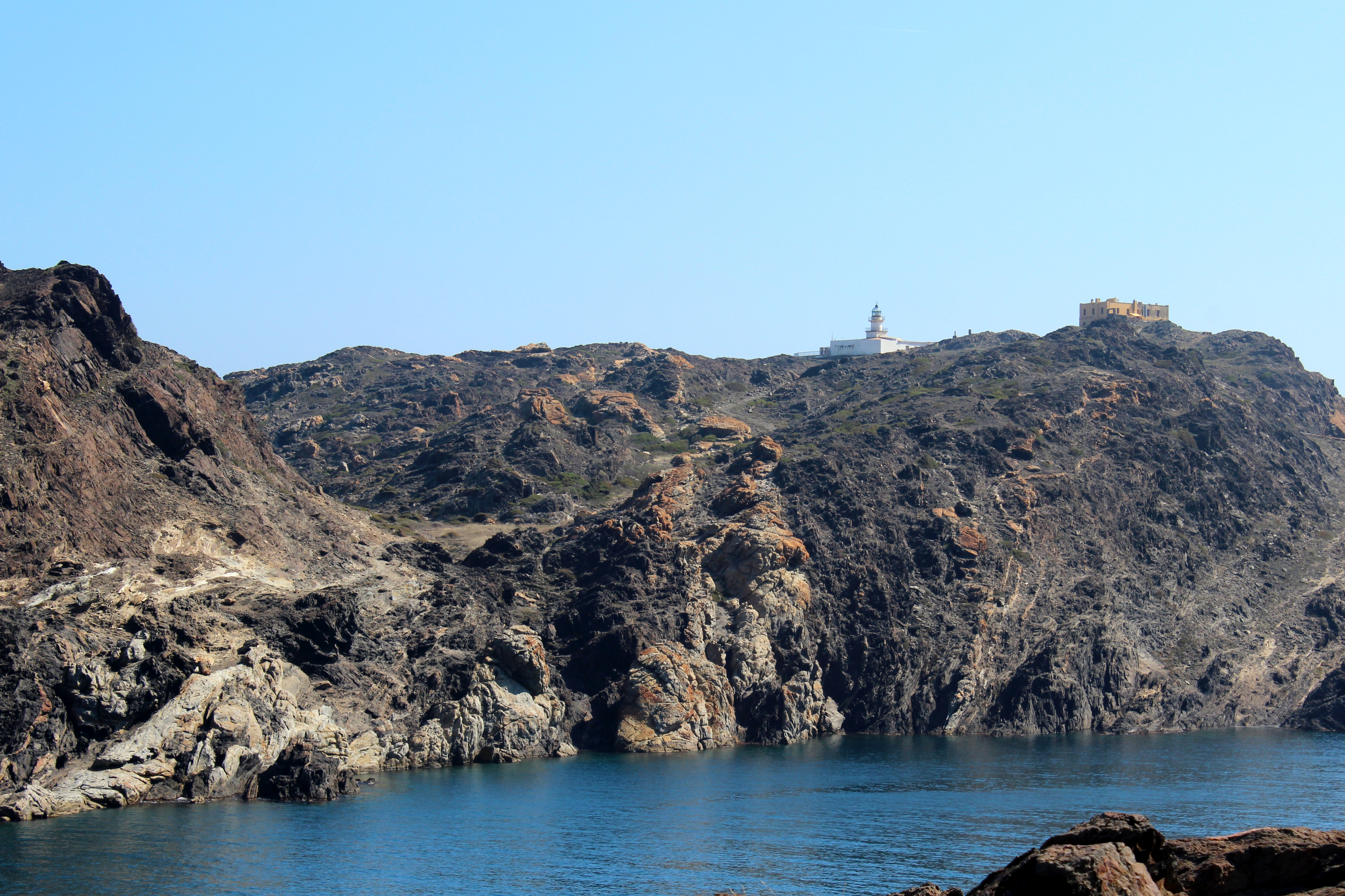 Cap de Creus This is a a photo of a natural area in Catalonia, Spain, with id: ES510092